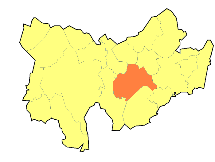 Hranice Nesovice (Vyškov-(Bučovice)- czech republic)